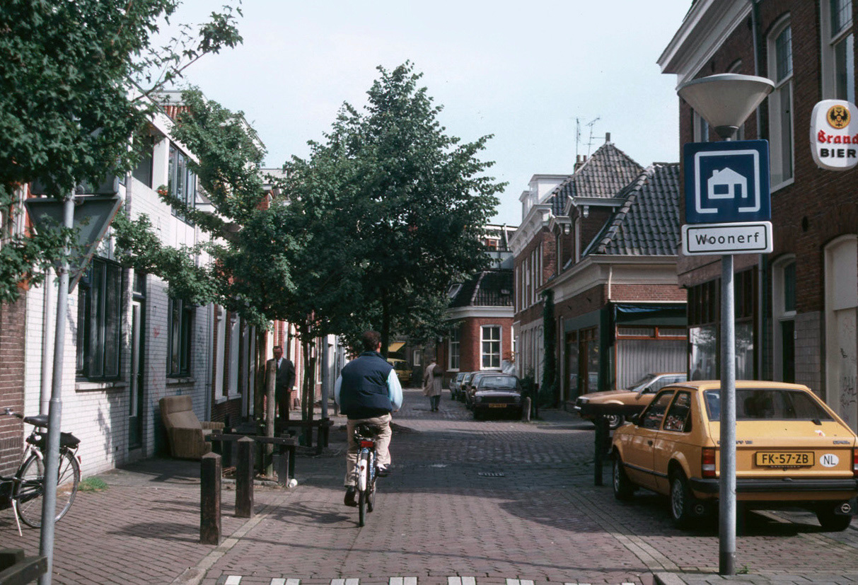 Nederlands Woonerf (Dan Burden)